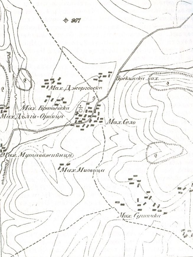 Карта на махалите на с. Извор, Босилерадско. Източник - Захариев, Йордан. Кюстендилското Краище, Сборник за народни умотворения и народопис, книга ХХХІІ, София 1918, с. 440, мярка - 1:25000.